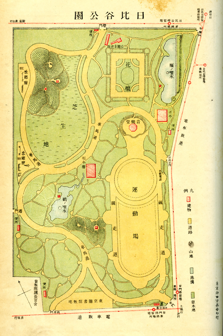 明治時代の日比谷公園案内図 運動場のやや上に音楽堂